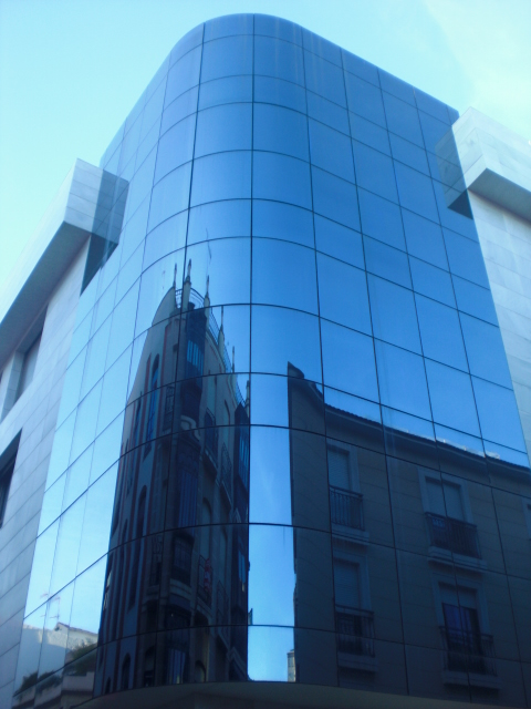 moderna konstruajxo en Ciudad Real